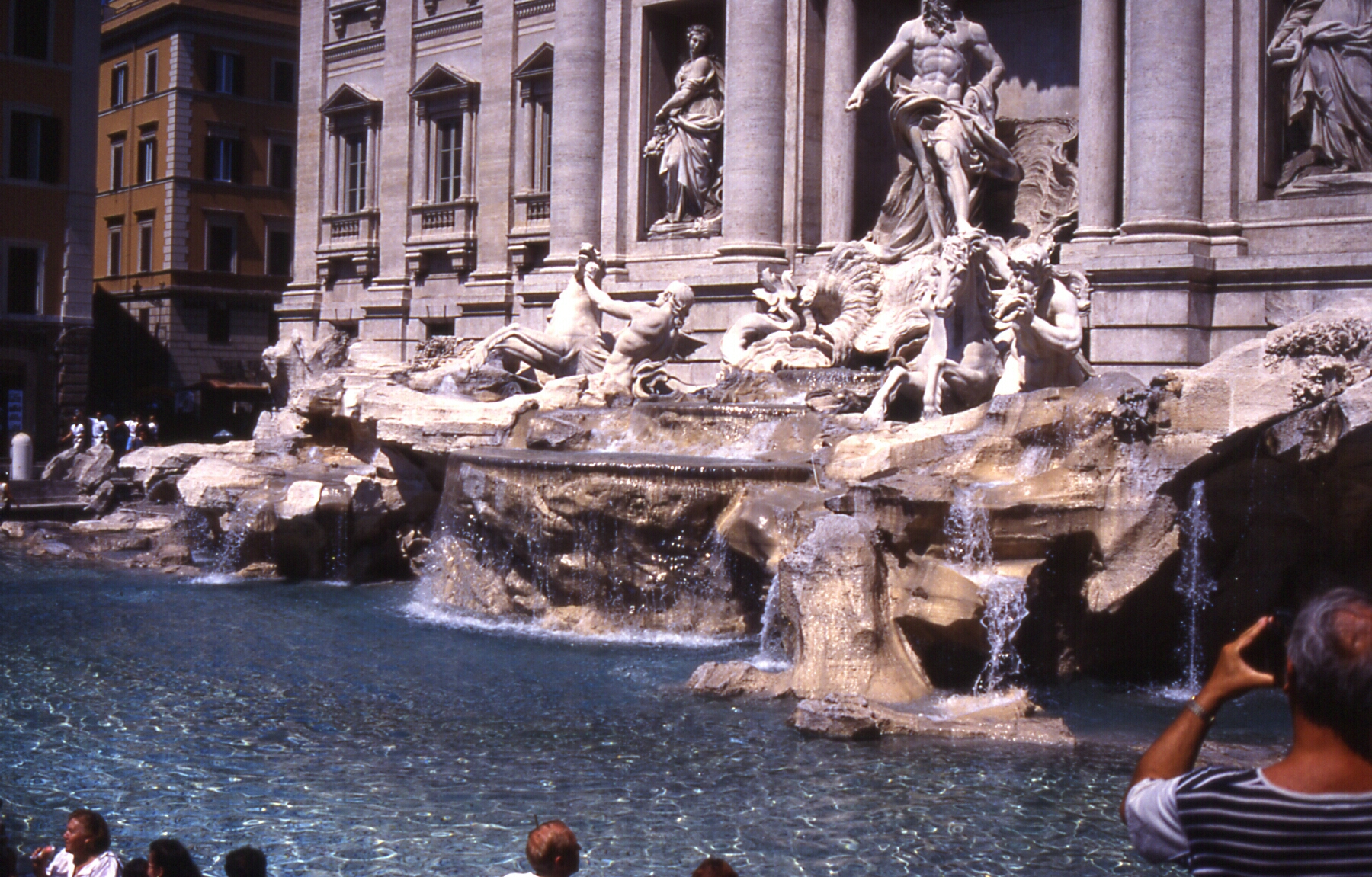 Rom TreviBrunnen Nahansicht 1995